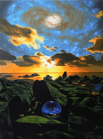 Gemälde von Gabriele L. Berndt